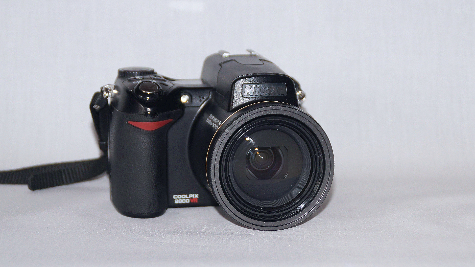 2004 Nikon Coolpix 8800VR - Foto Wolfgang Pehlemann DSC04859.jpg